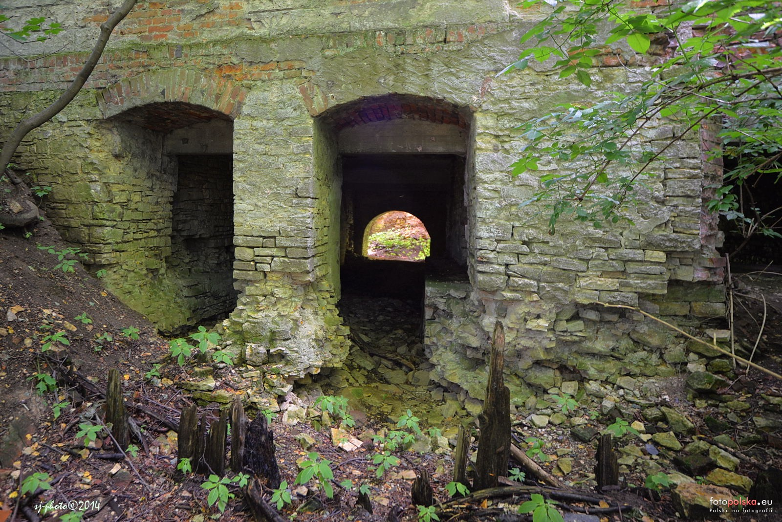 Młyn Amerykan